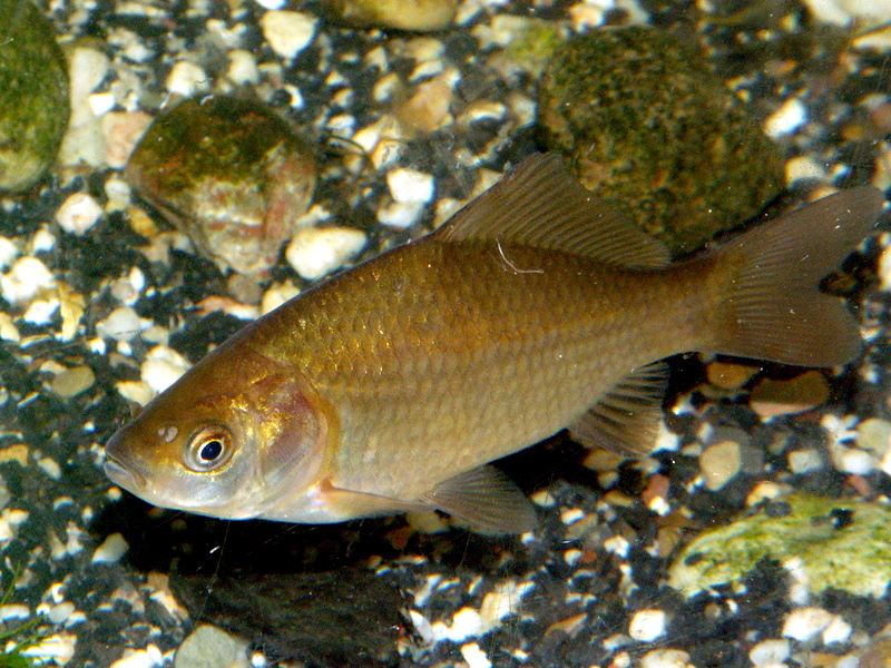 Giebel/Goudvis (Carassius auratus gibelio)